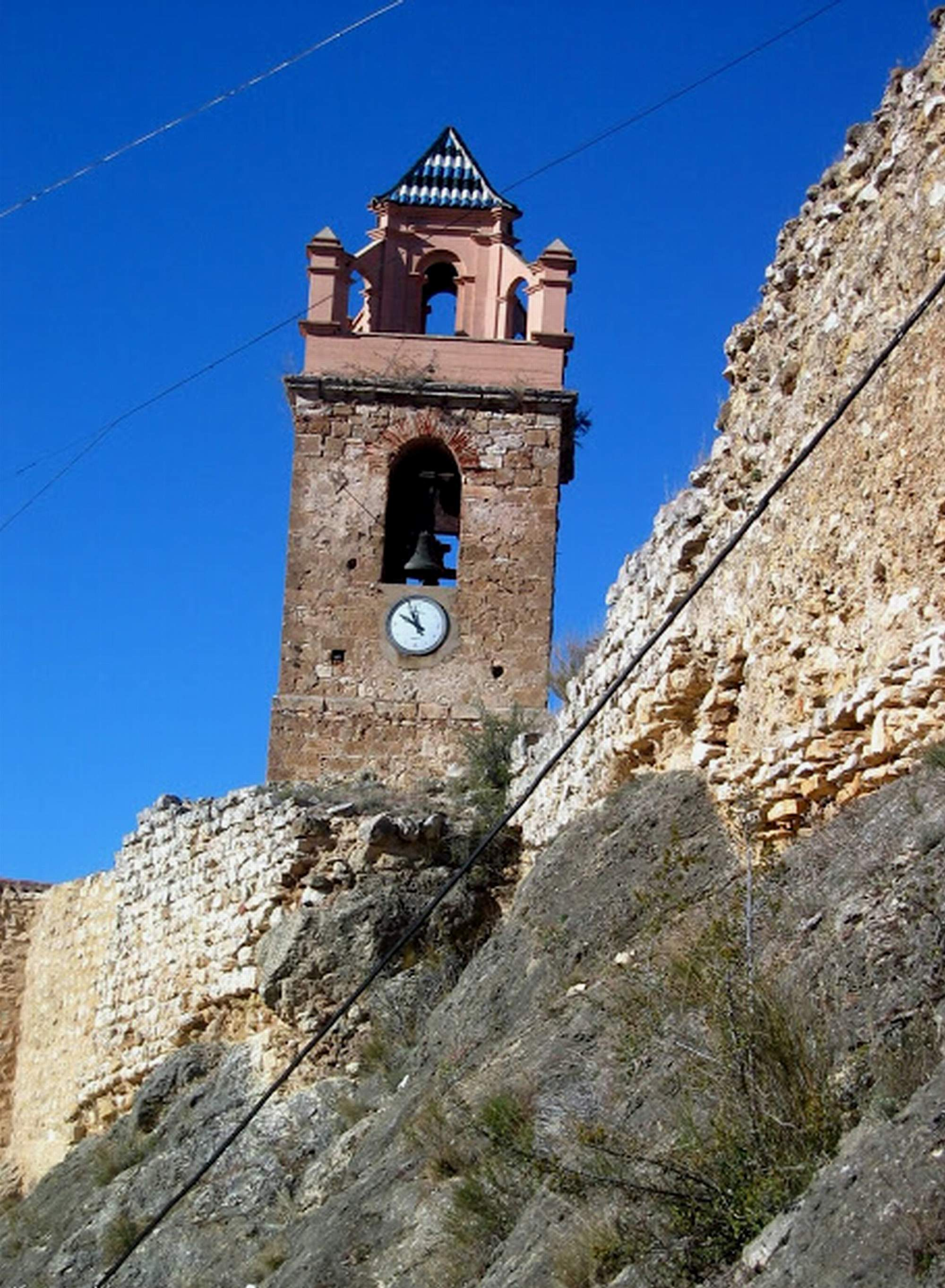 El campanario es una estructura exenta, ubicada en el solar del castillo, a la cabecera del templo, lado de la epístola y forma parte del conjunto monumental de la Iglesia-fortaleza de Castielfabib (Valencia).